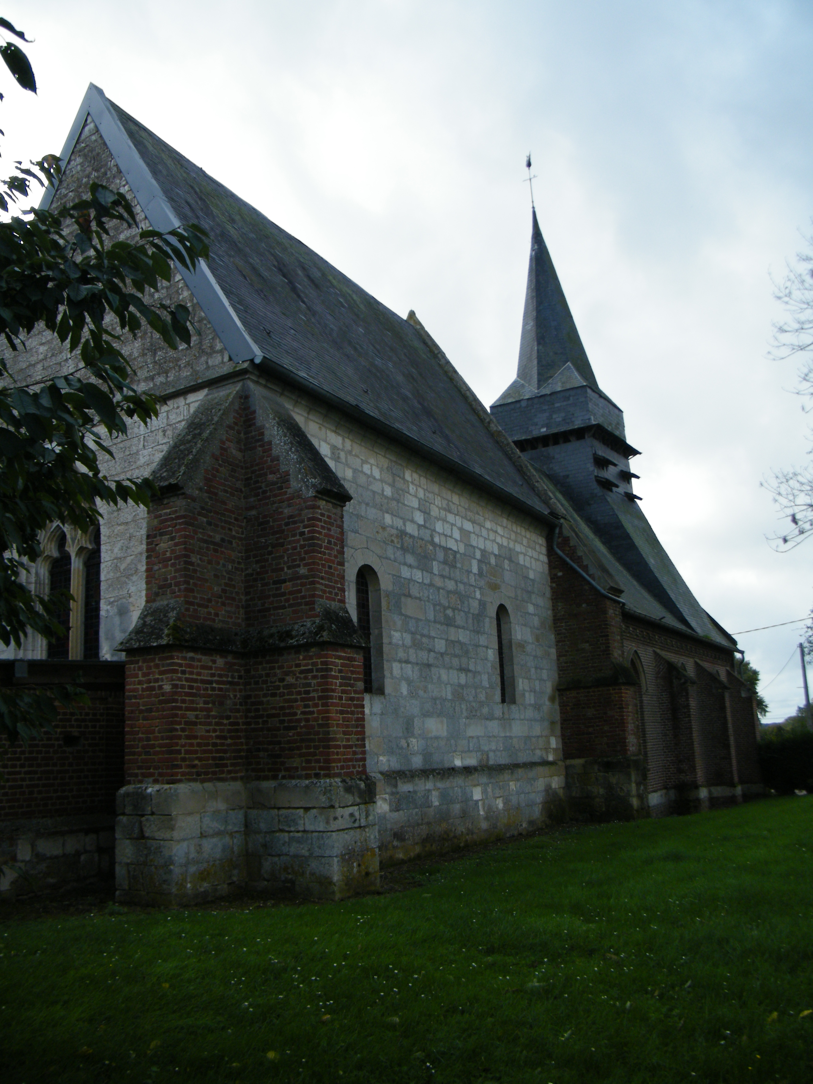 église.